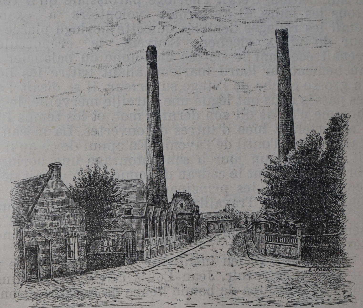 issue de l'almanach de 1910.